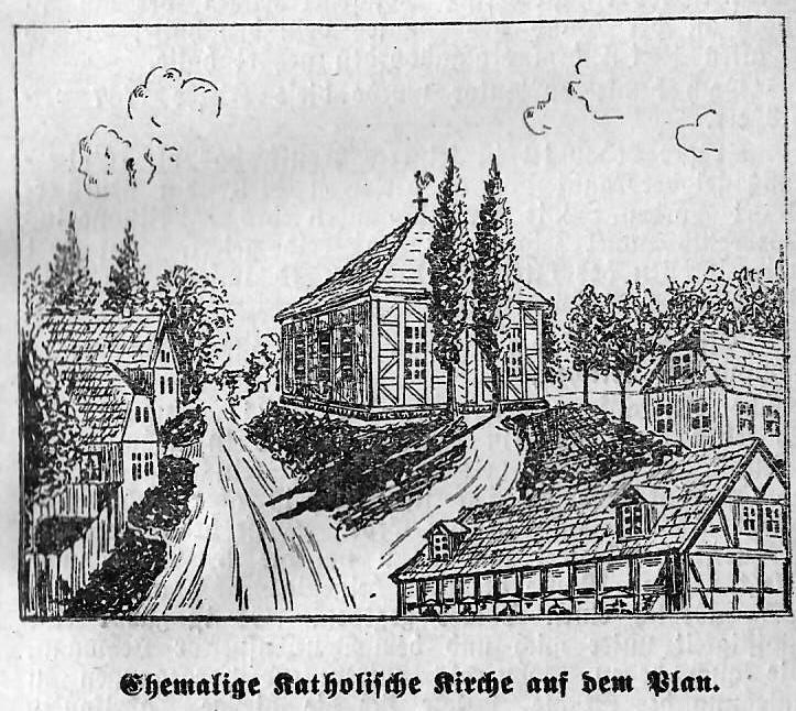 Kirche auf dem Gewehrplan, (Berlin-) Spandau, Baubegionn 1766, Abriss va. 1849. Quelle: Franz Kohstall: Geschichte der katholischen Pfarrgemeinde Sankt Marien zu Spandau. Verlag von August Malinowski, Spandau o. J. [1924], S. 39